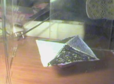 Foto del video Image:Lamentesobrelamateria.ogg